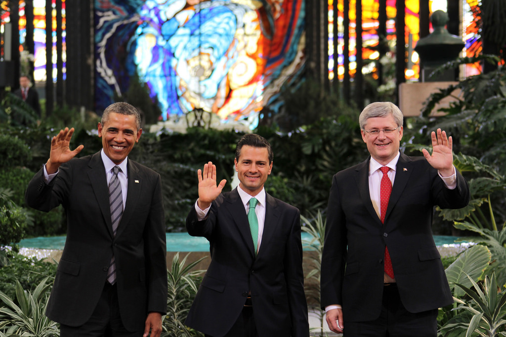 Fotografía Oficial al interior del Cosmovitral Jardín Botánico. Toluca, Estado de México. 19 de febrero de 2014.